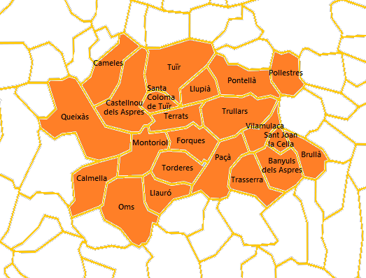 Mapa del Cantó 1 dels Aspres elaborat a partir d'un mapa de lliure disposició